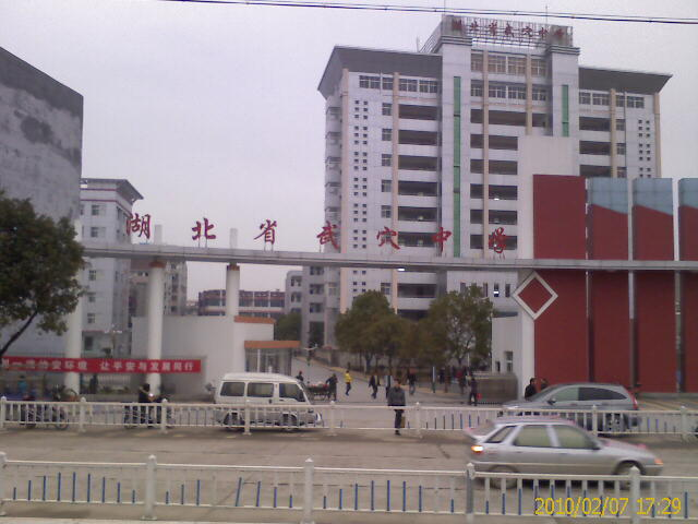 武穴中學校門